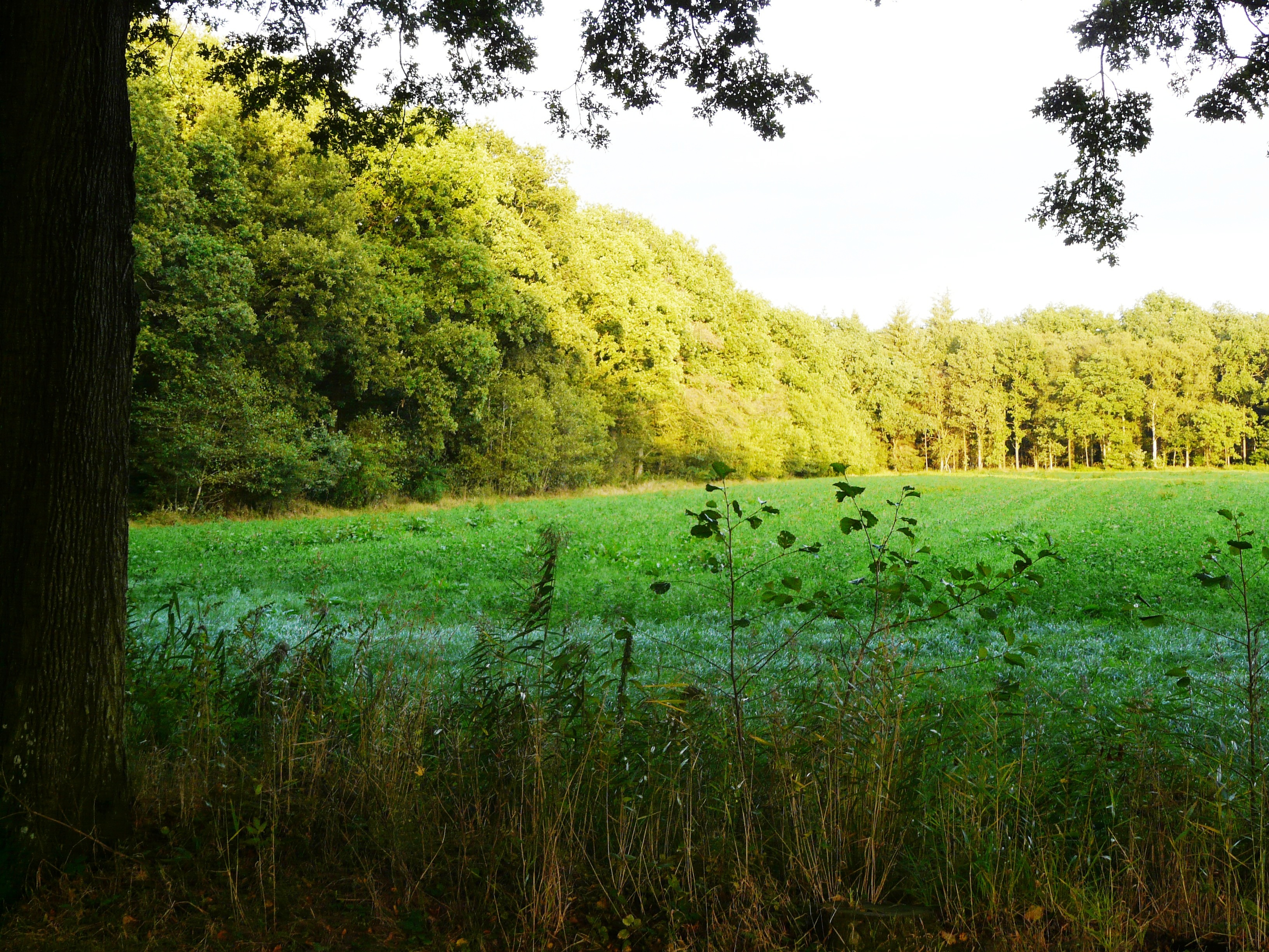 Boskich Olterterp